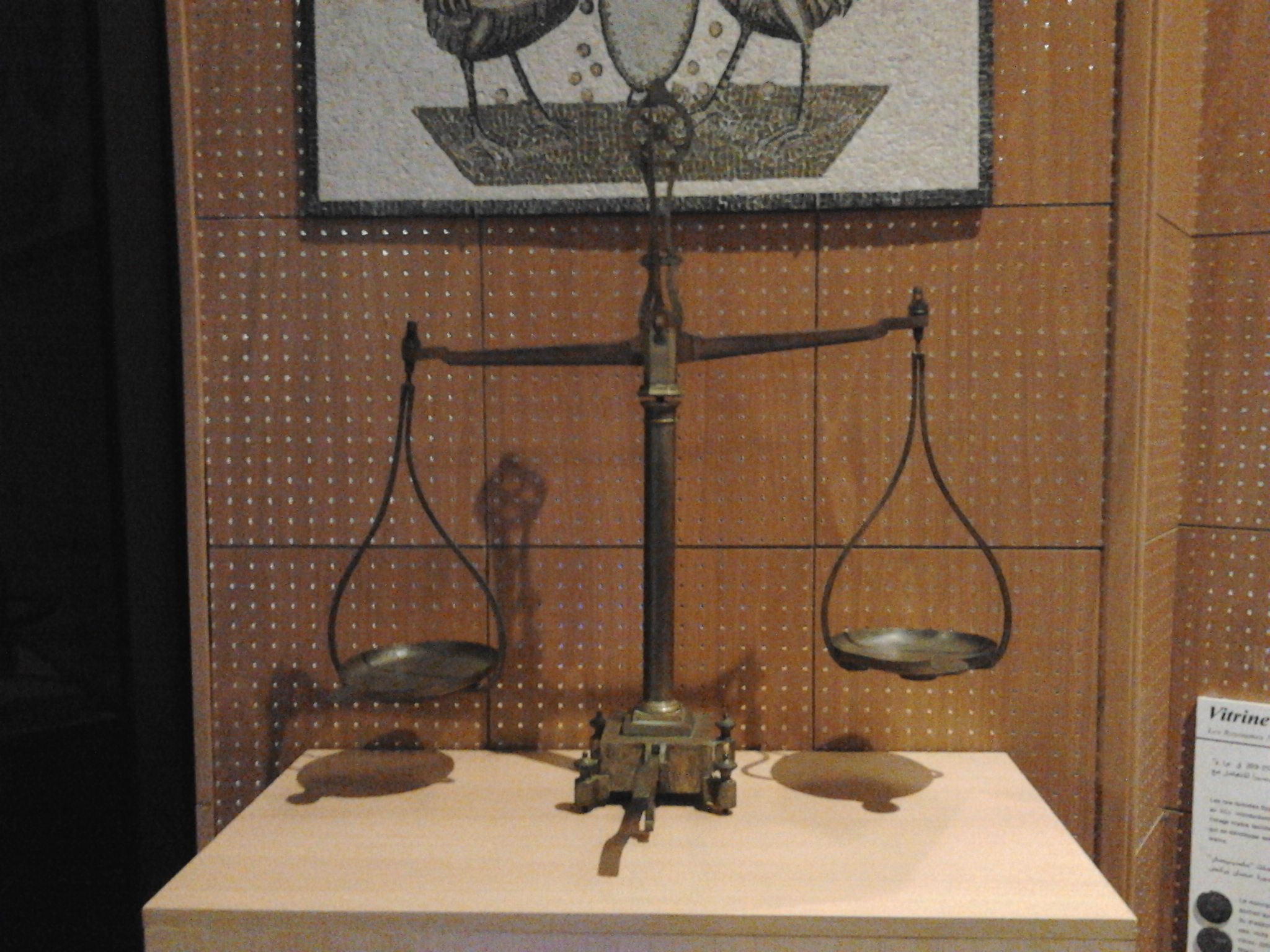 Musé de la monnaie - Banque centrale tunisienne - Avenue Mohammed V - Tunis